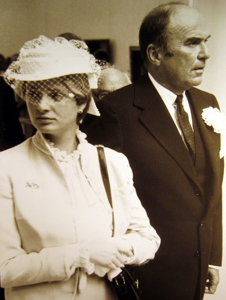 Gloria von Thurn und Taxis an der Seite ihres Mannes, Johannes Prinz von Thurn und Taxis